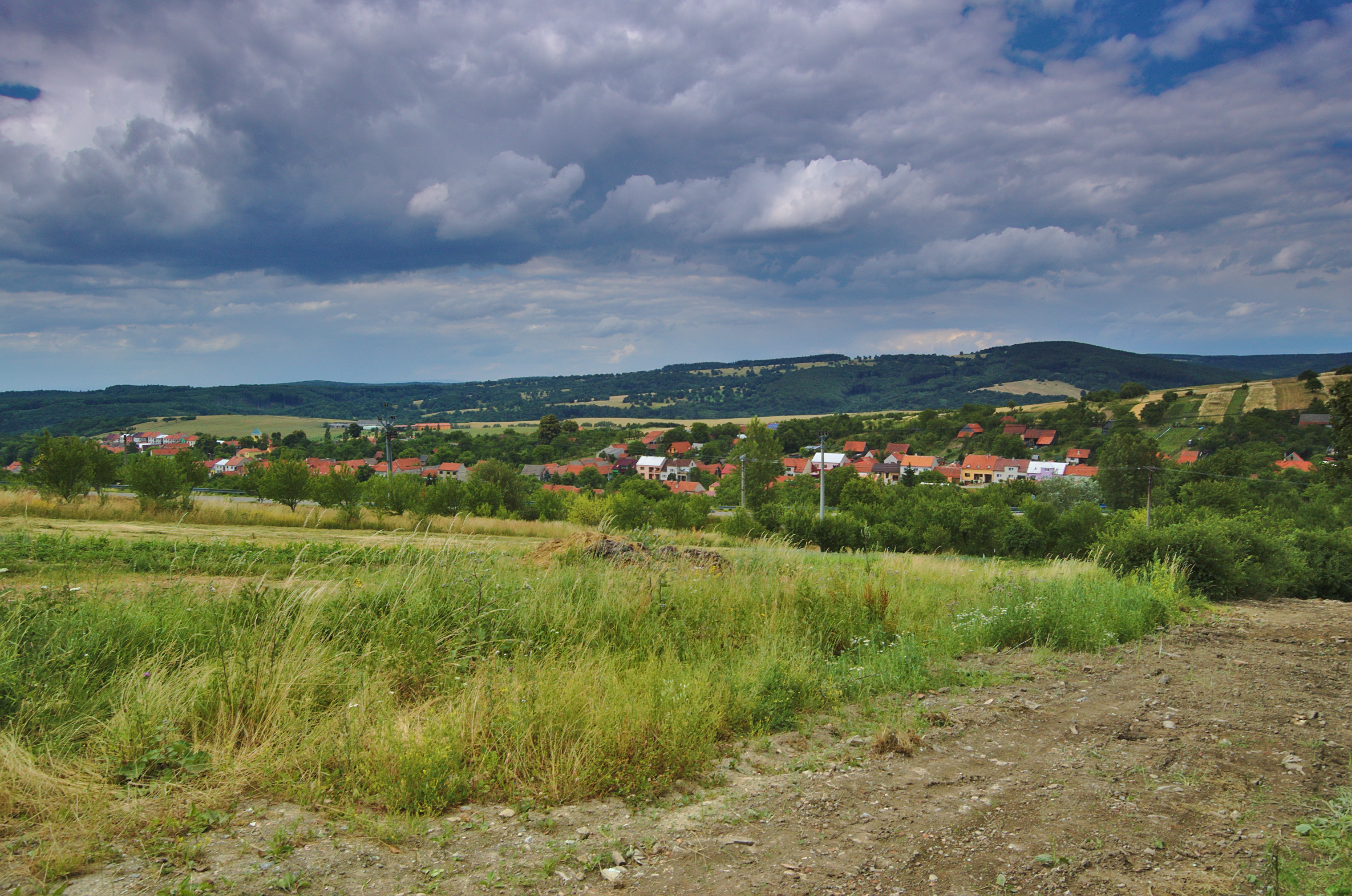 Pohled na Novou Lhotu od západu, okres Hodonín